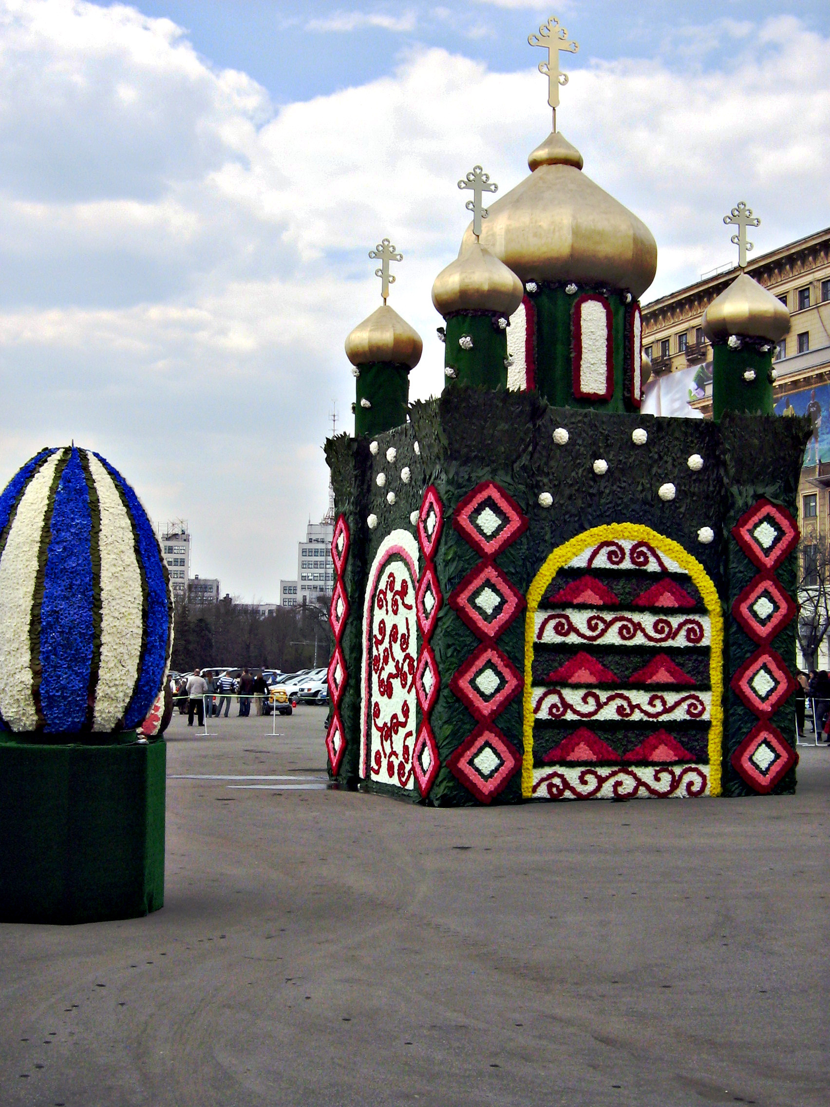 Церковь на площади Свободы в Харькове. 24 апреля 2011 года. Пасха.